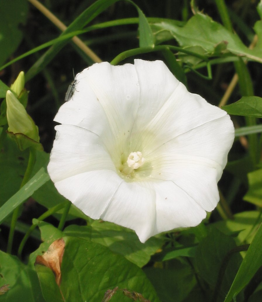 Bloem van Haagwinde Calystegia sepium; eind juni.